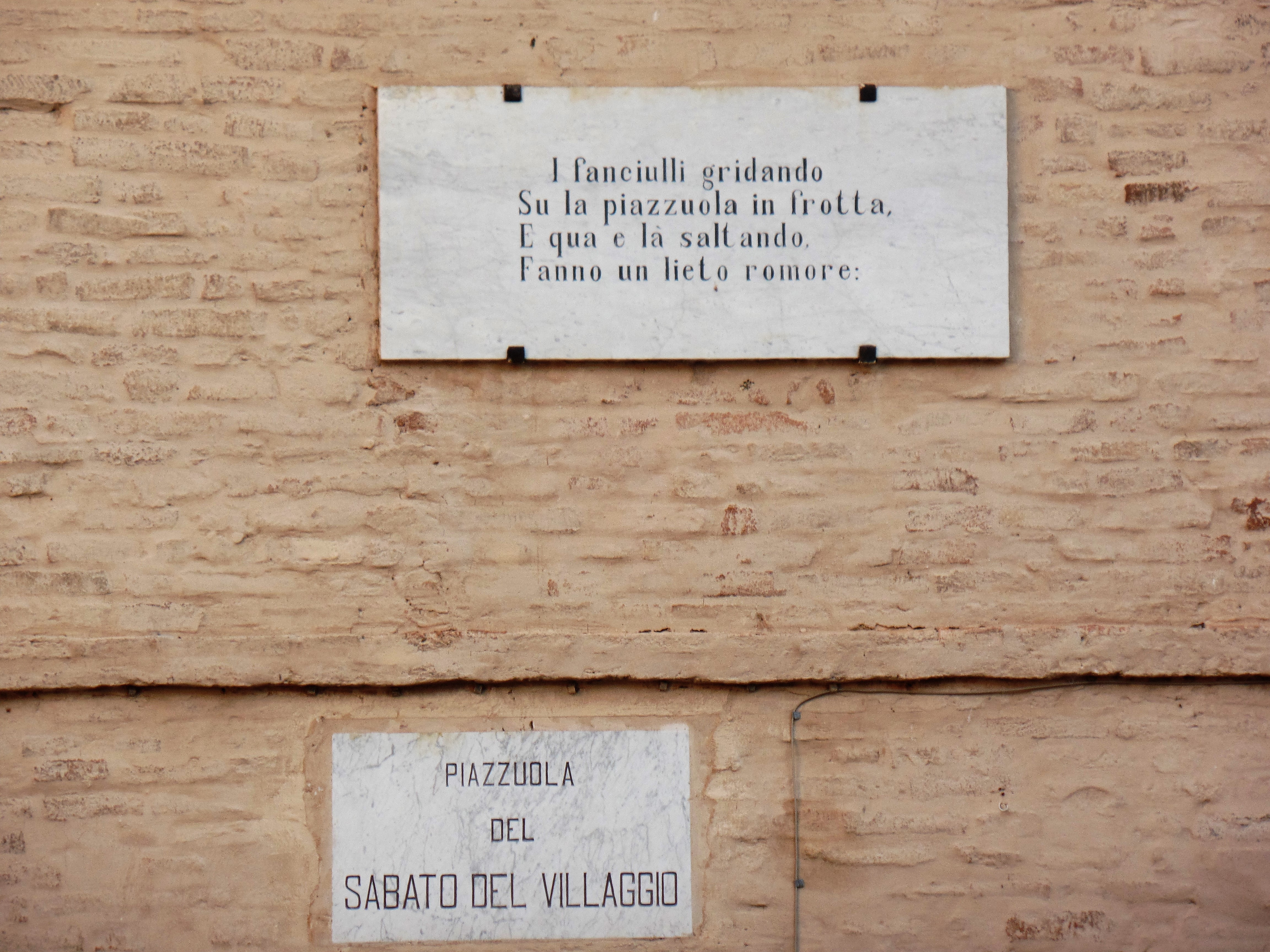 Sabato del Villaggio verso in Piazza a Recanati